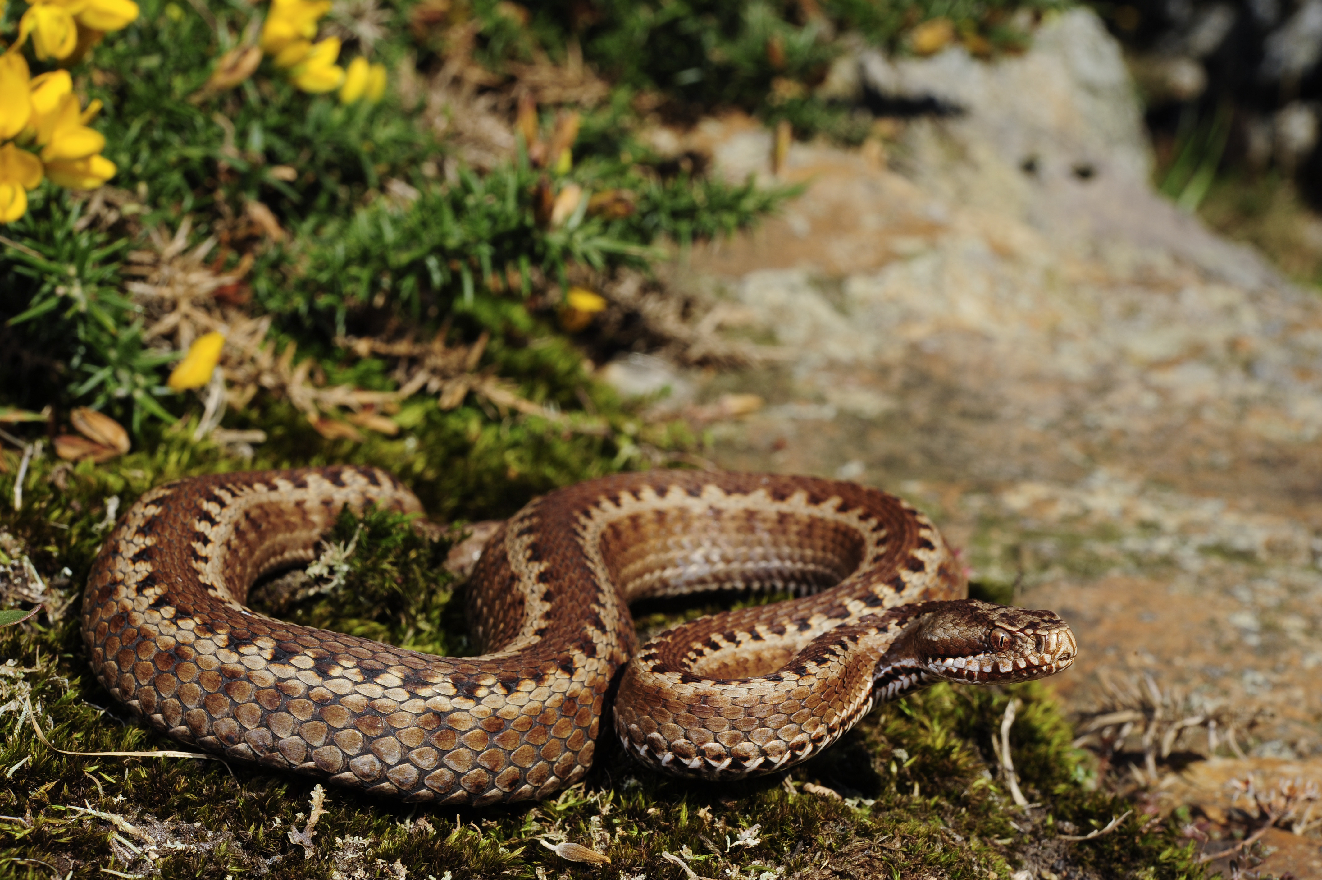 Nordiberische Kreuzotter, Iberienotter aus dem Pyrenäen